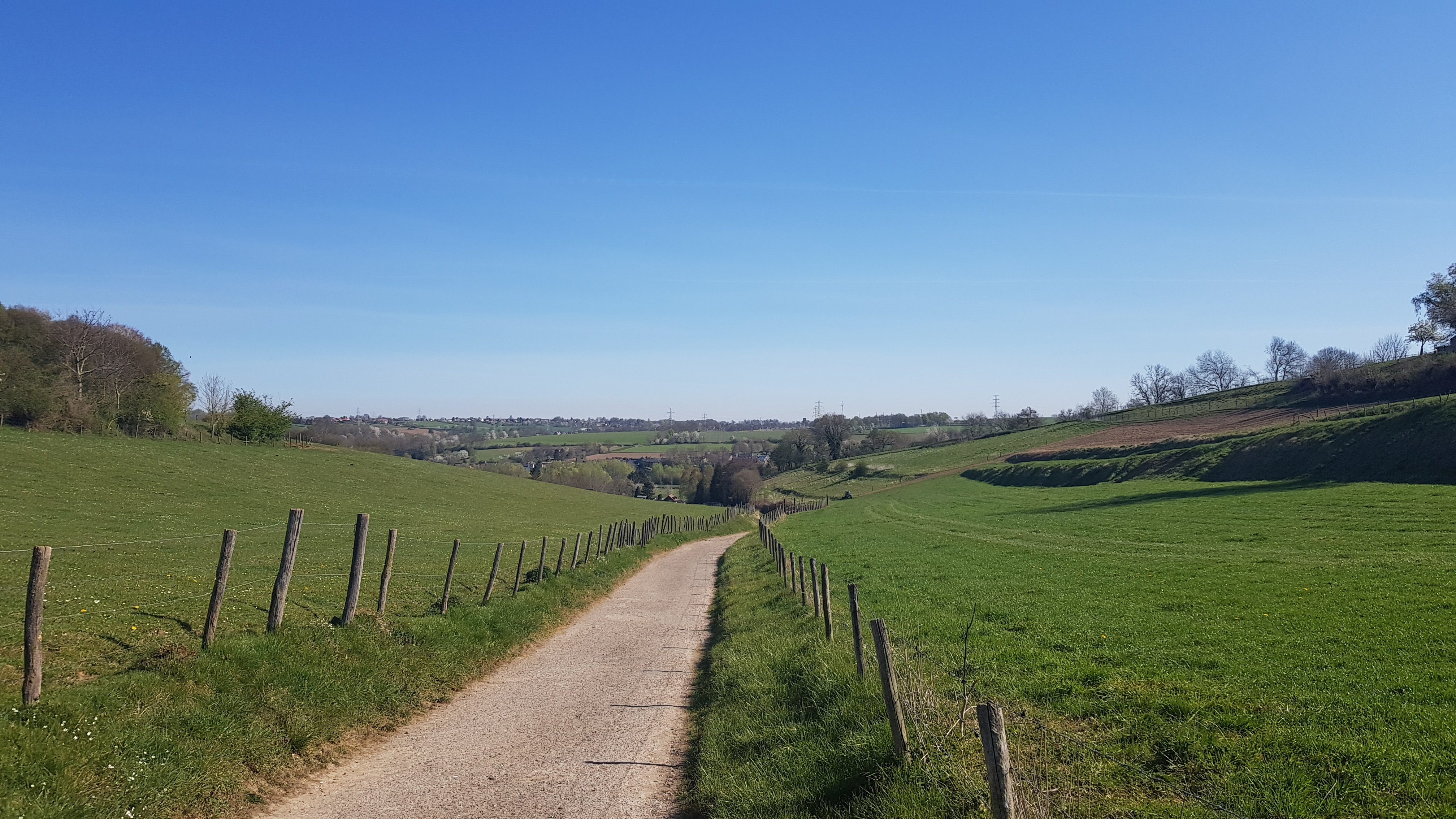 Engwegengrub, Schin op Geul, Nederland